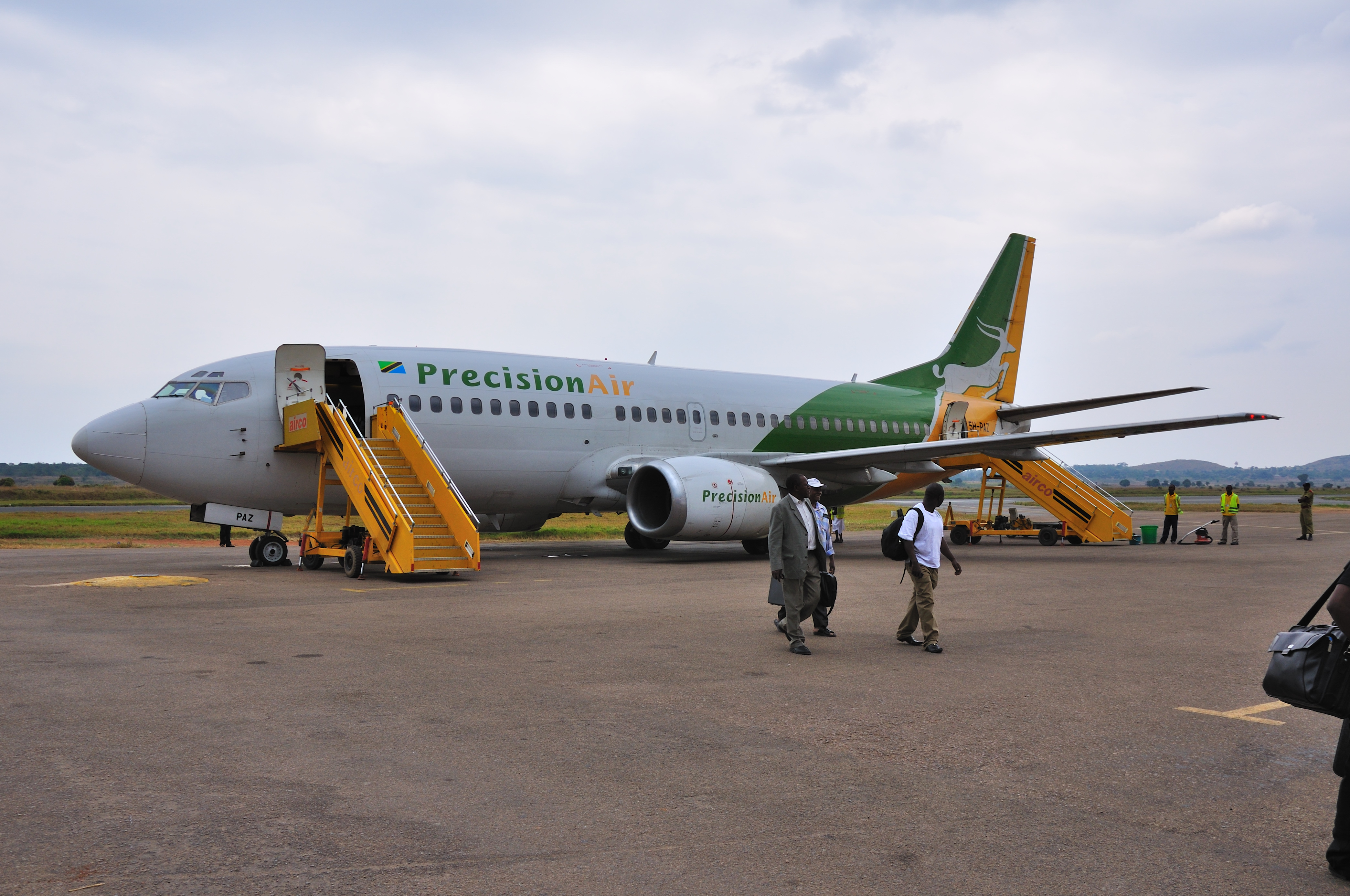 Tanzania, Precision Air's B737 at Mwanza Airport